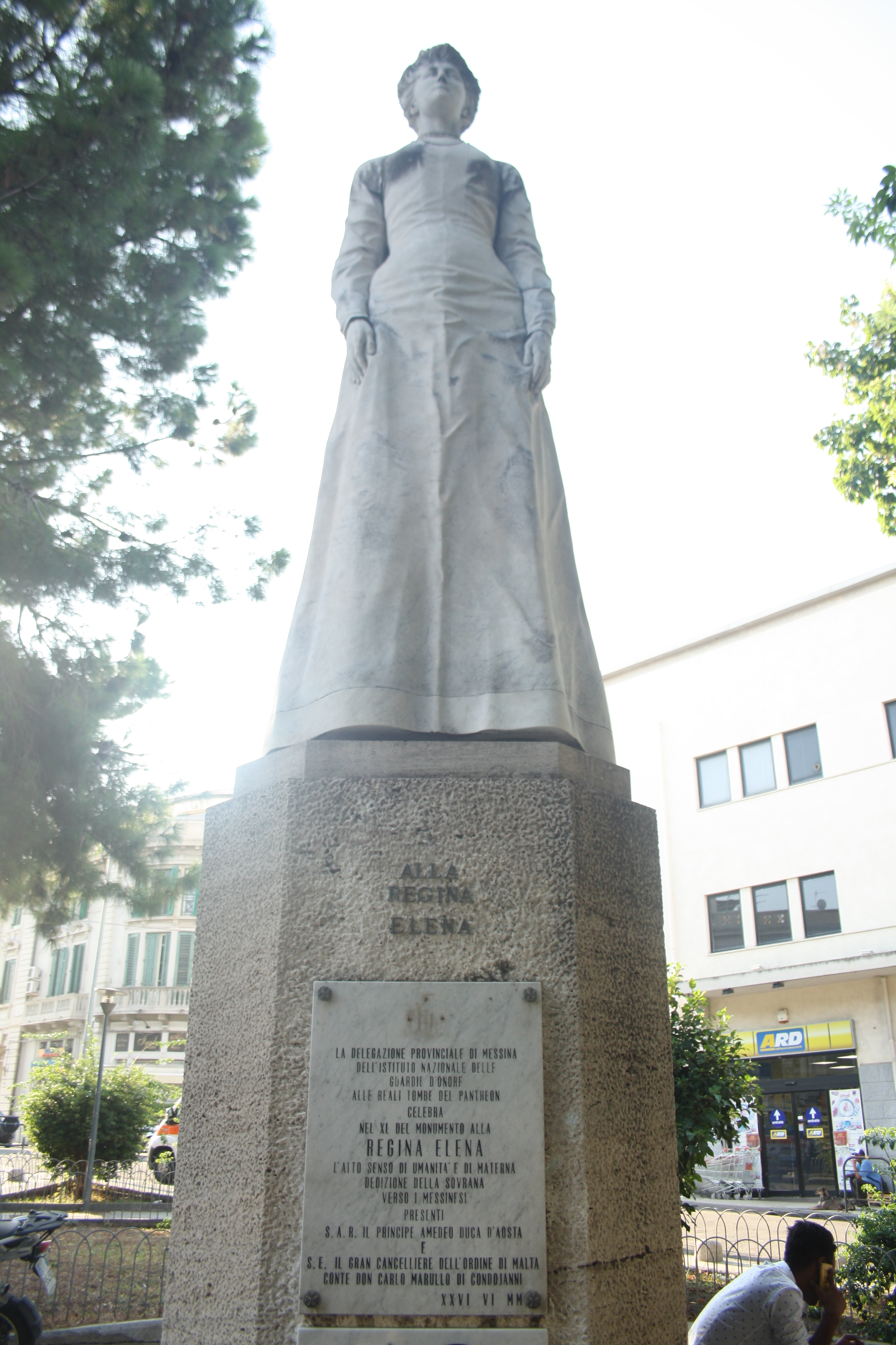 Monumento a Elena di Savoia This is a photo of a monument which is part of cultural heritage of Italy.